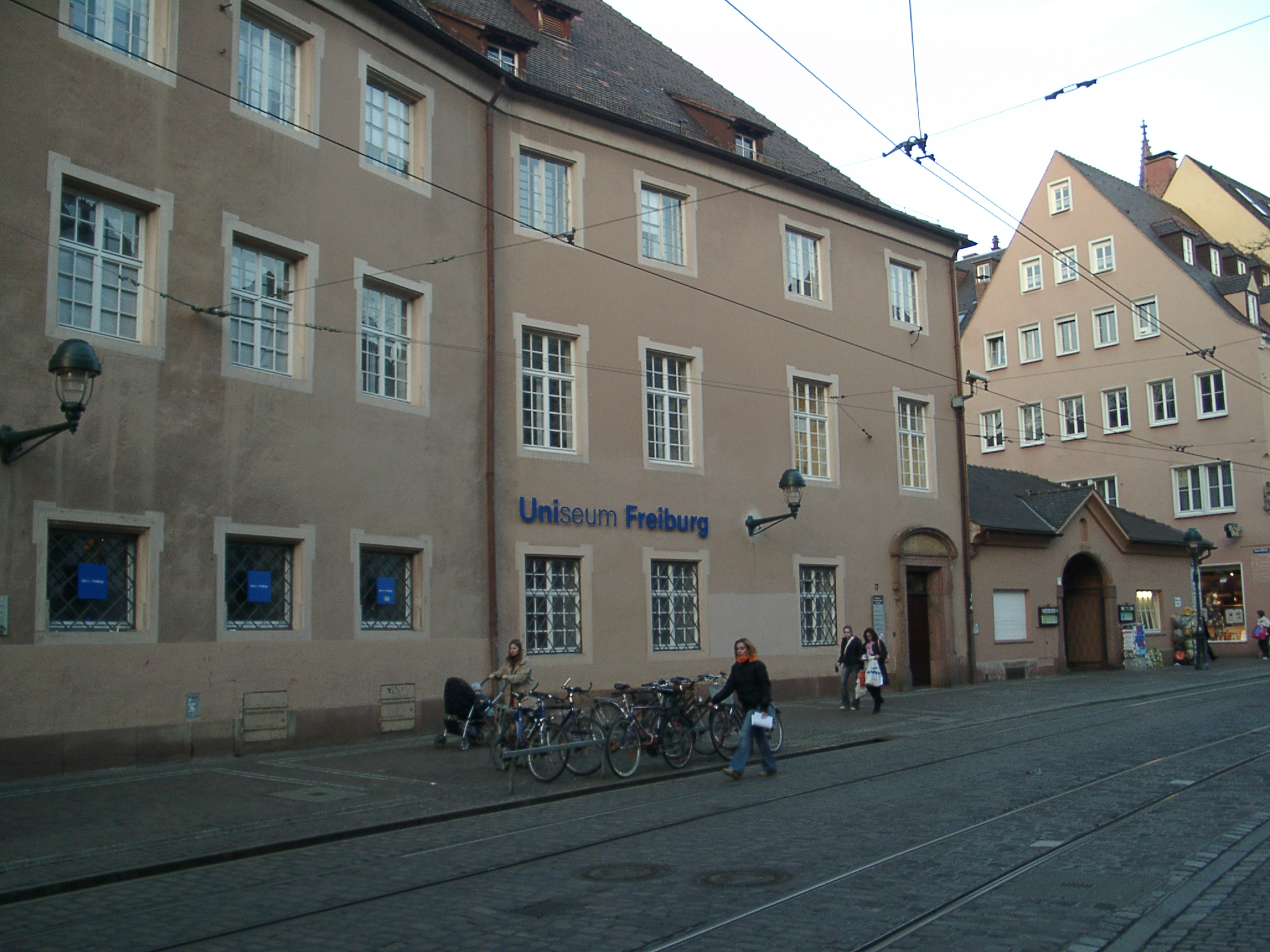 Uniseum in Freiburg i.Br. - selbst fotografiert (Klaus Graf) 9.2.2005 - Lizenz: CC-BY